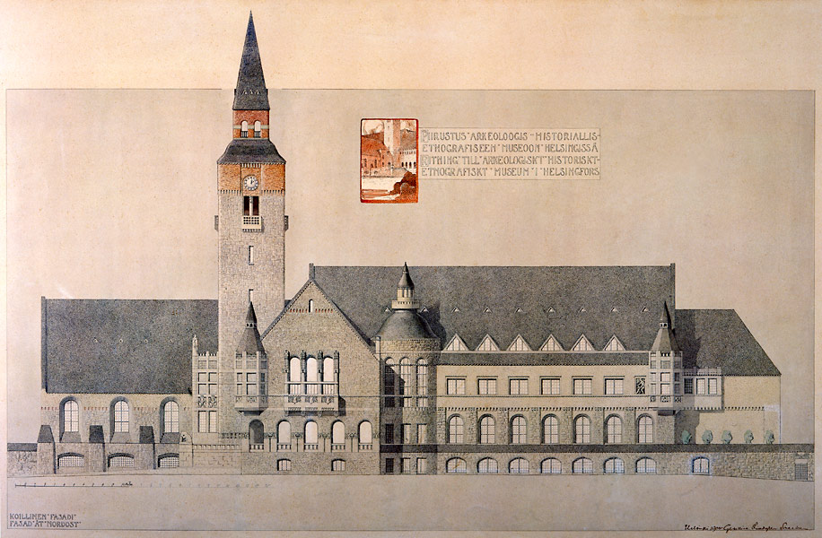 Проект Национального музея Финляндии